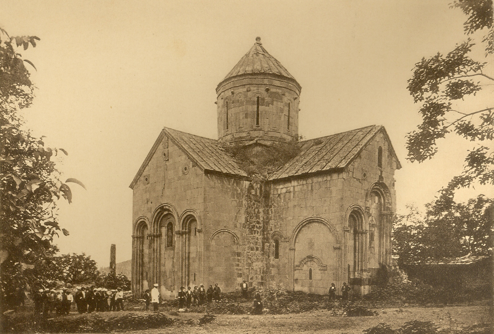 ტბეთი, 1888 - პავლინოვის ფოტო